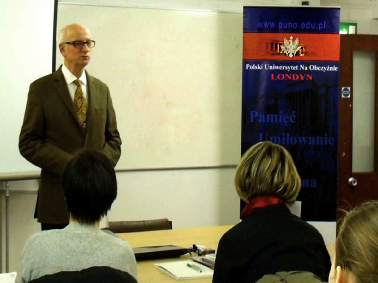 Prof. Władysław Miodunka - w trakcie zajęć ze studentami Polskiego Uniwersytetu Na Obczyźnie w Londynie.